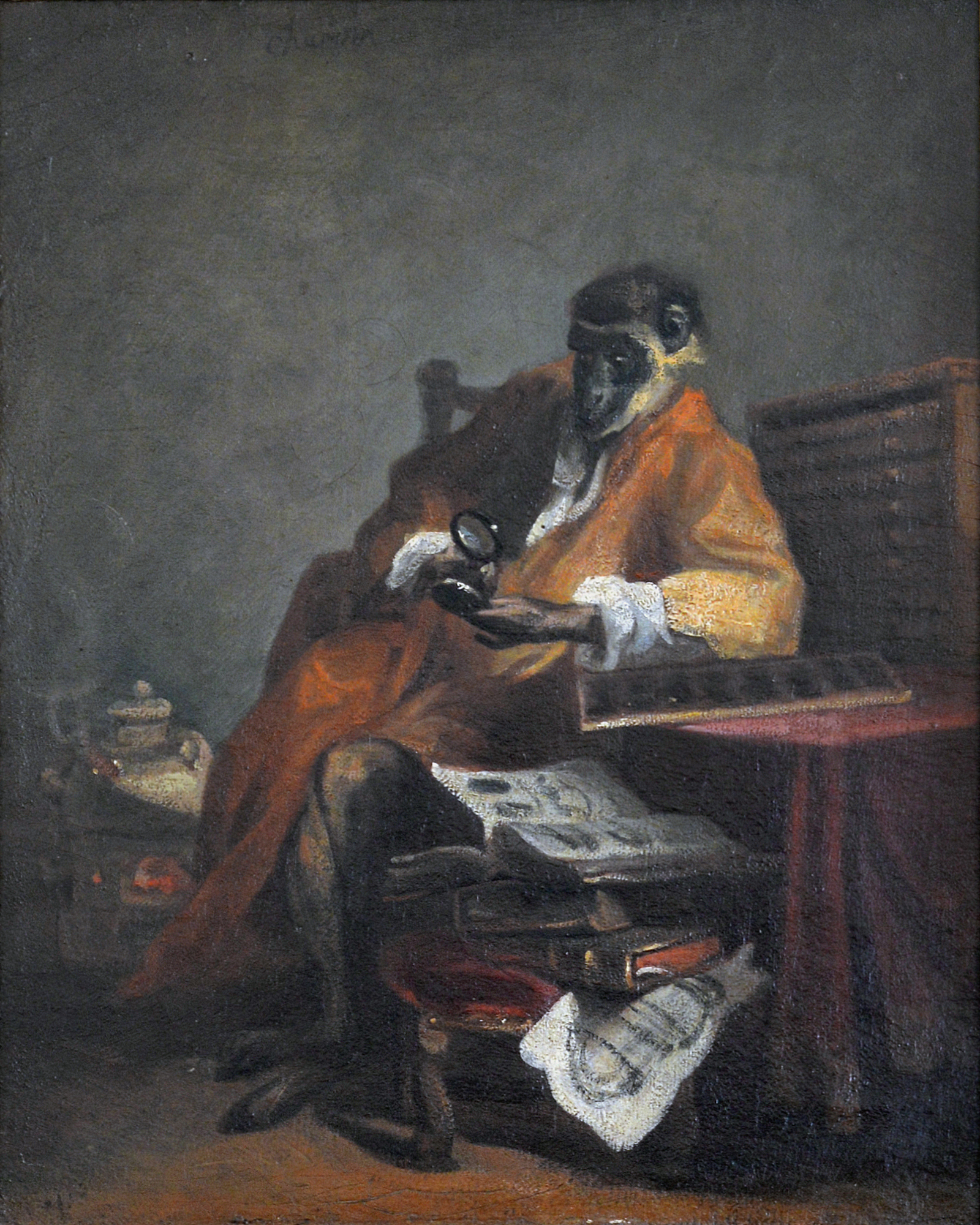 Jean-Baptiste Siméon Chardin (1699-1779) - Le singe antiquaire - Huile sur toile, don Mme Garnier-Courtois, 1898, musée des beaux-arts de Chartres, Eure-et-Loir (France).